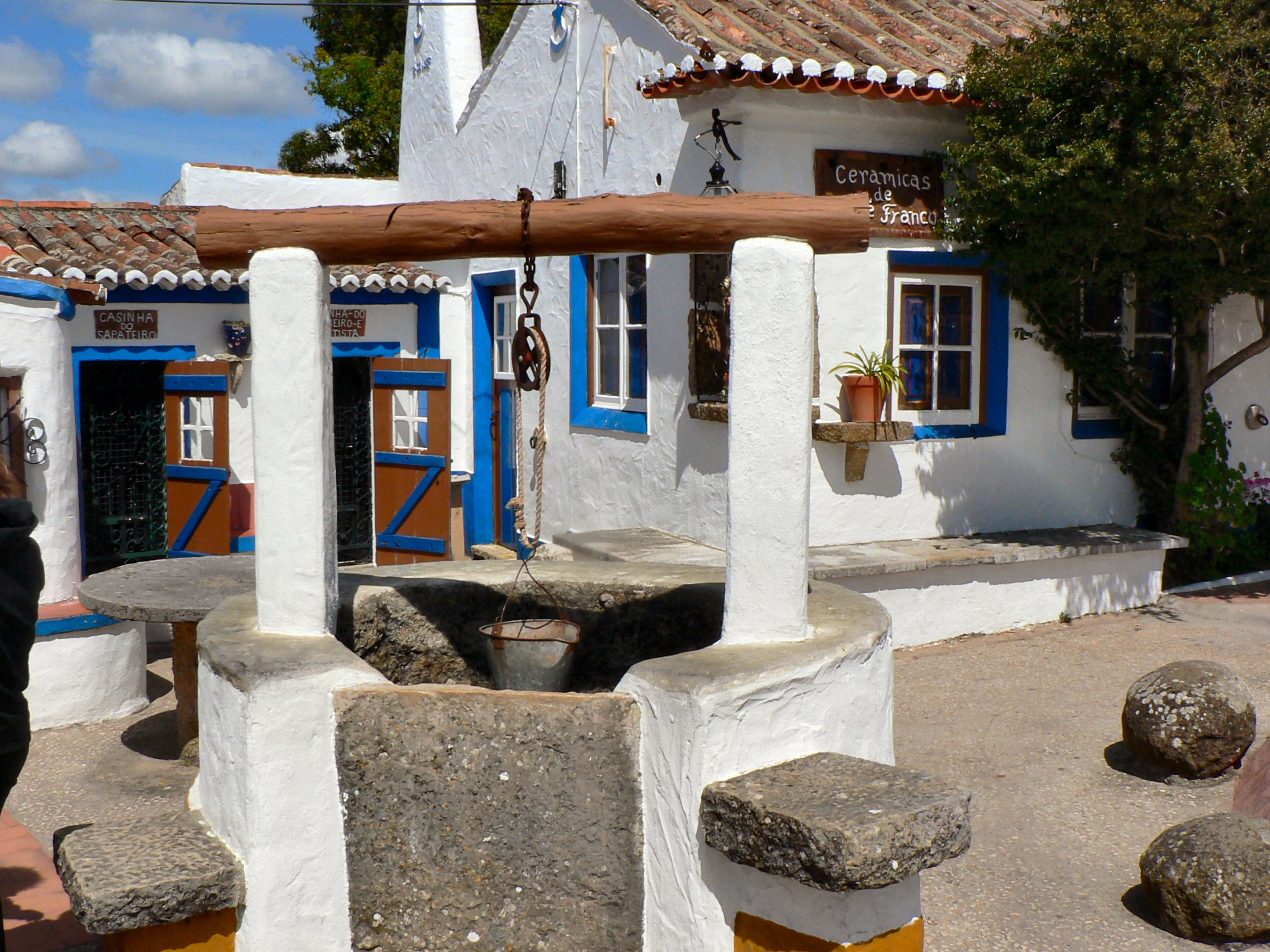 O poço na Aldeia típica de José Franco Autor: Paulo Juntas